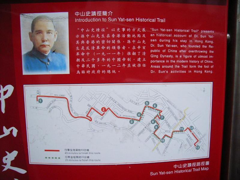 香港上環普仁坊卜公花園Sheung Wan, Hong Kong